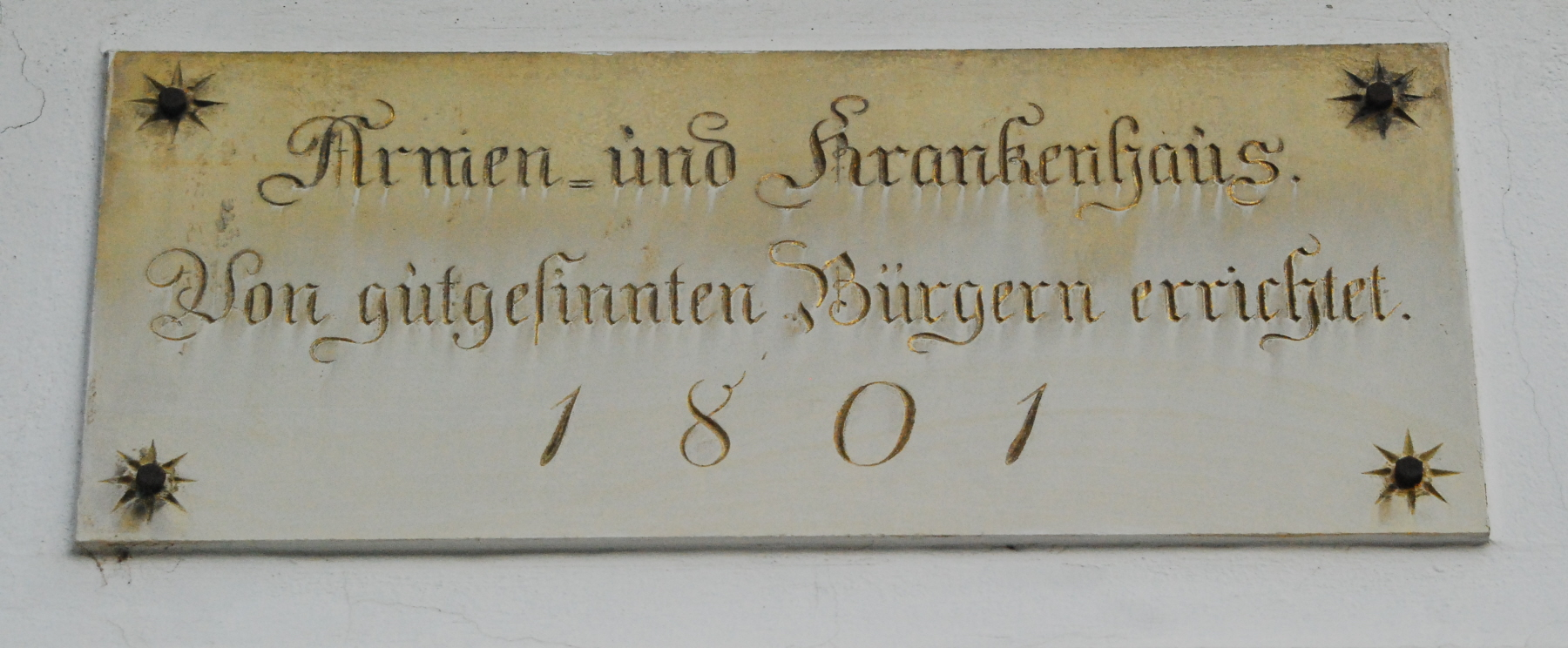 ehemaliges Krankenhaus